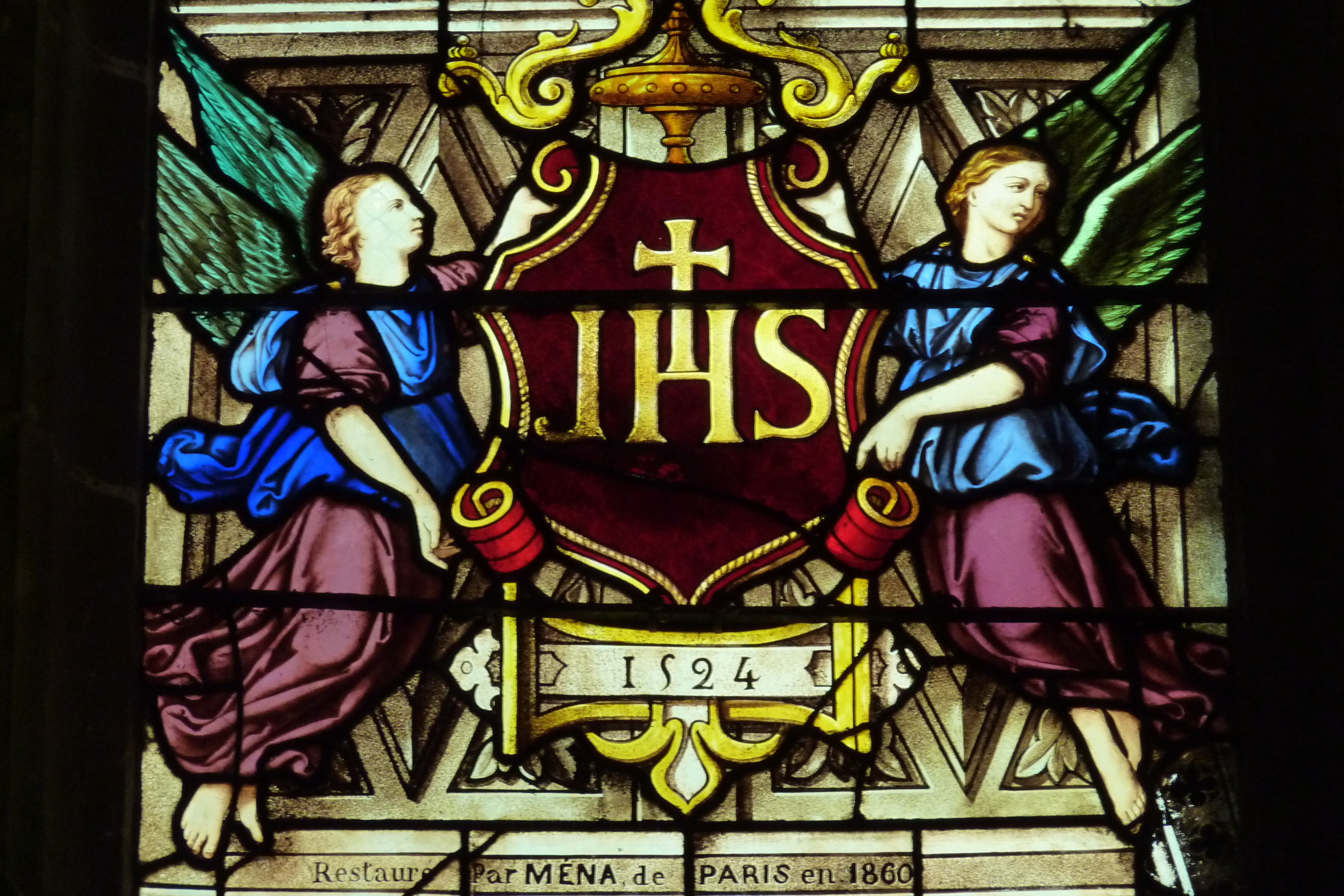 Bleiglasfenster (Ausschnitt) Nr. 0 in der katholischen Pfarrkirche Saint-Martin (Collégiale Saint-Martin) in Montmorency, mittleres Chorfenster von 1524, restauriert 1860 von Ména in Paris; Darstellung: IHS (siehe: Dominique Foussard, Charles Huet, Mathieu Lours: Églises du Val-d'Oise. Pays de France, Vallée de Montmorency. Société d'Histoire et d'Archéologie de Gonesse et du Pays de France, 2. Auflage, Gonesse 2011, ISBN 9782953155426)